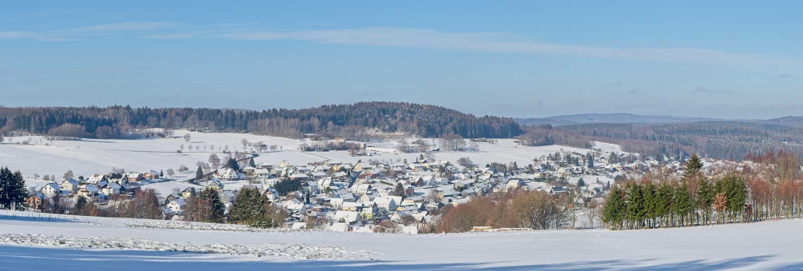 Derschen